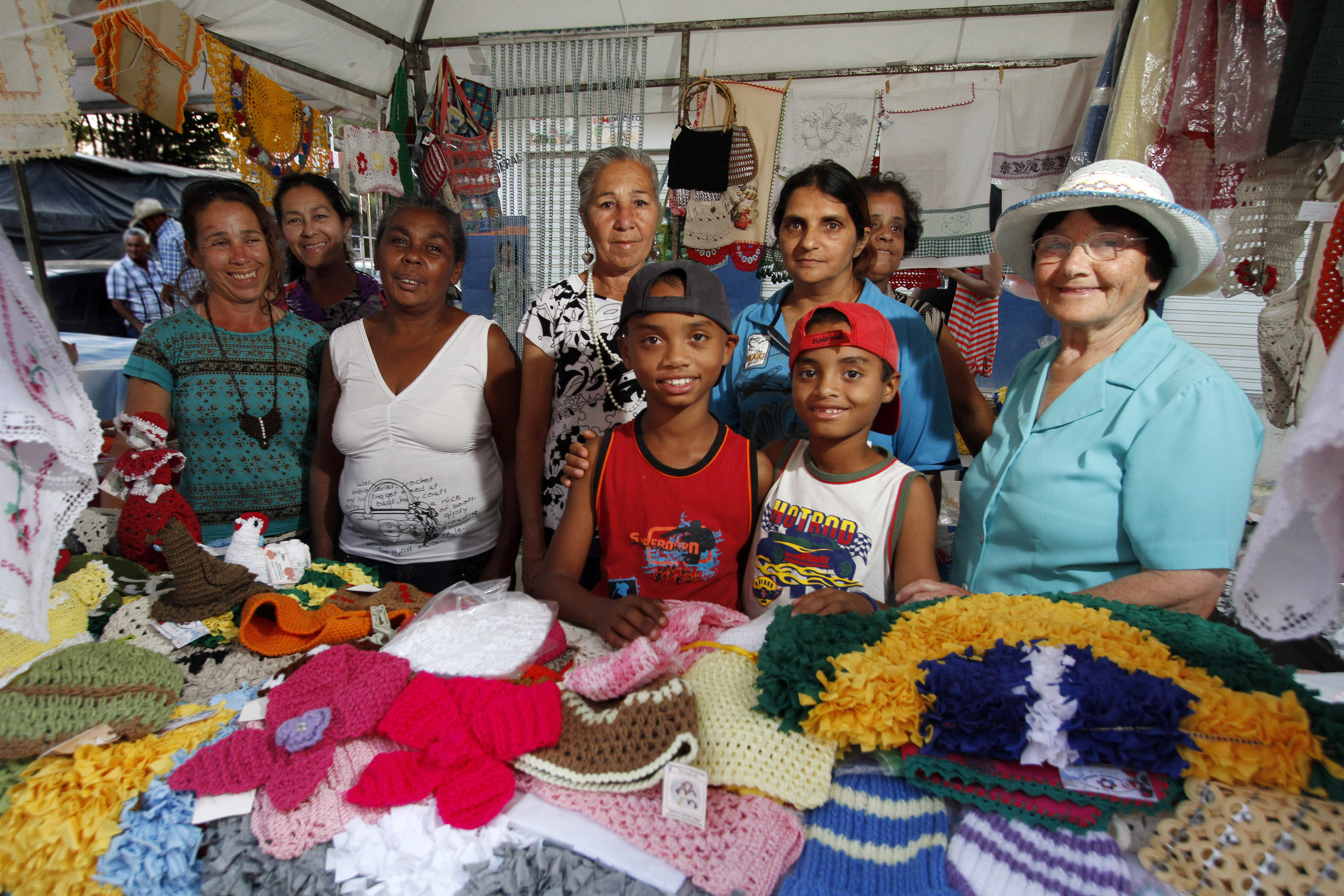 Especial Bolsa Familia. Novo Cruzeiro. materia sobre as beneficiarias do Programa Bolsa Familia . Na foto Mulheres e criancas beneficiadas em Novo Cruzeiro.Foto: Leonardo Lara/Aldeia 05-09-2010